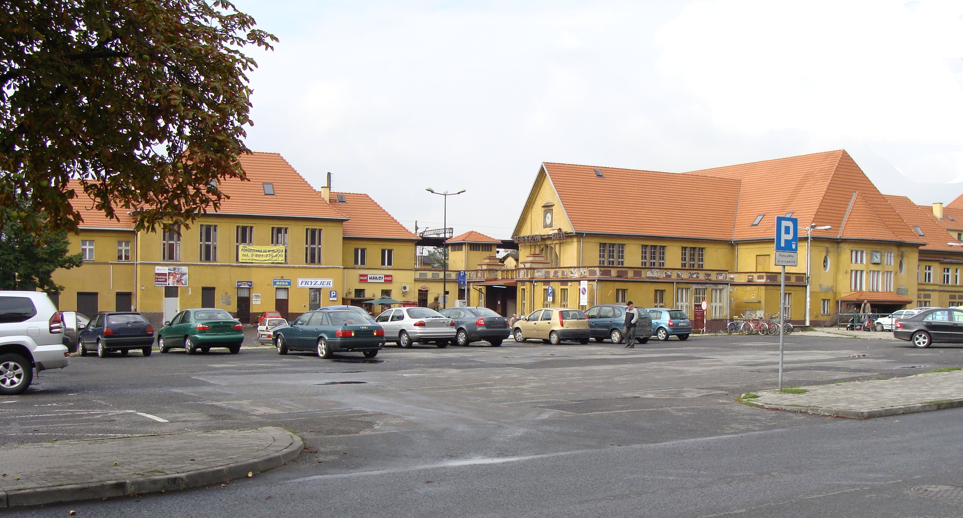 Kędzierzyn Koźle - wejście na stację kolejową PKP